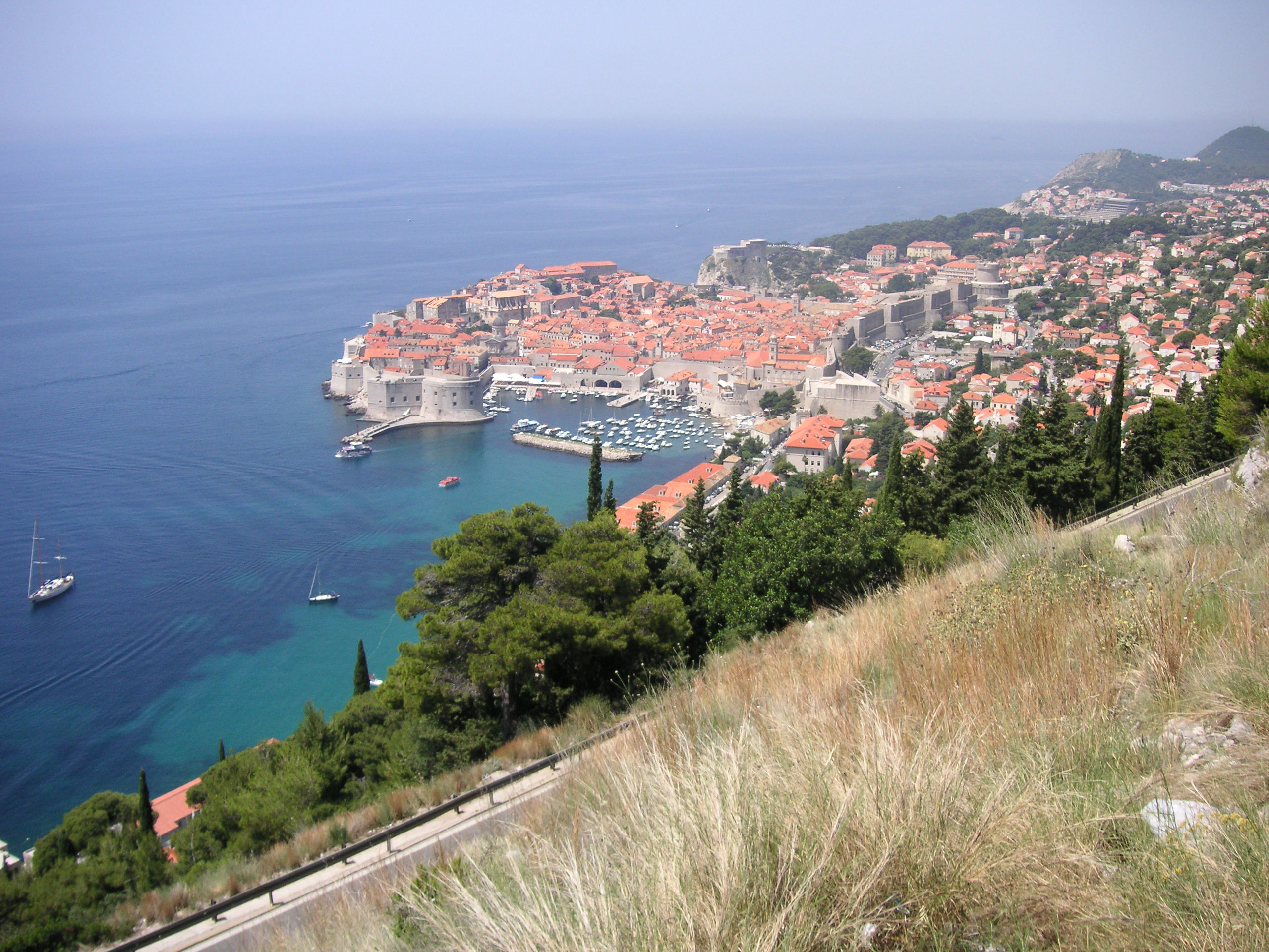 Dubrovnic, Croatia